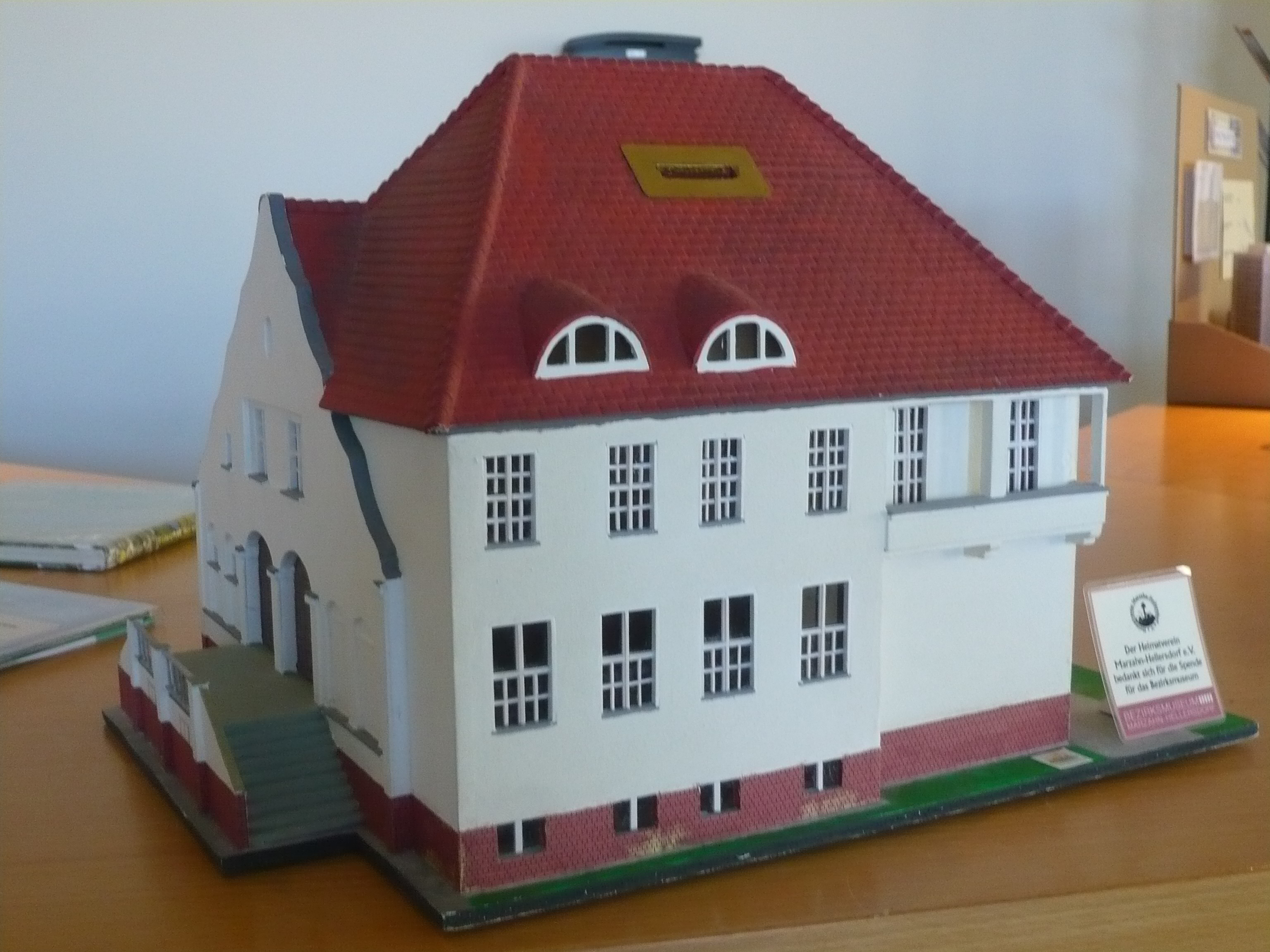 Ortsteil Berlin-Marzahn, Museum (eh. Dorfschulhaus) auf dem Dorfanger: Modell des Gebäudes